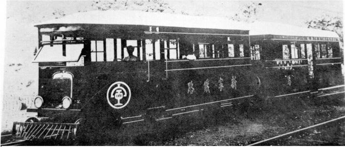 新宁轻便铁路车厢